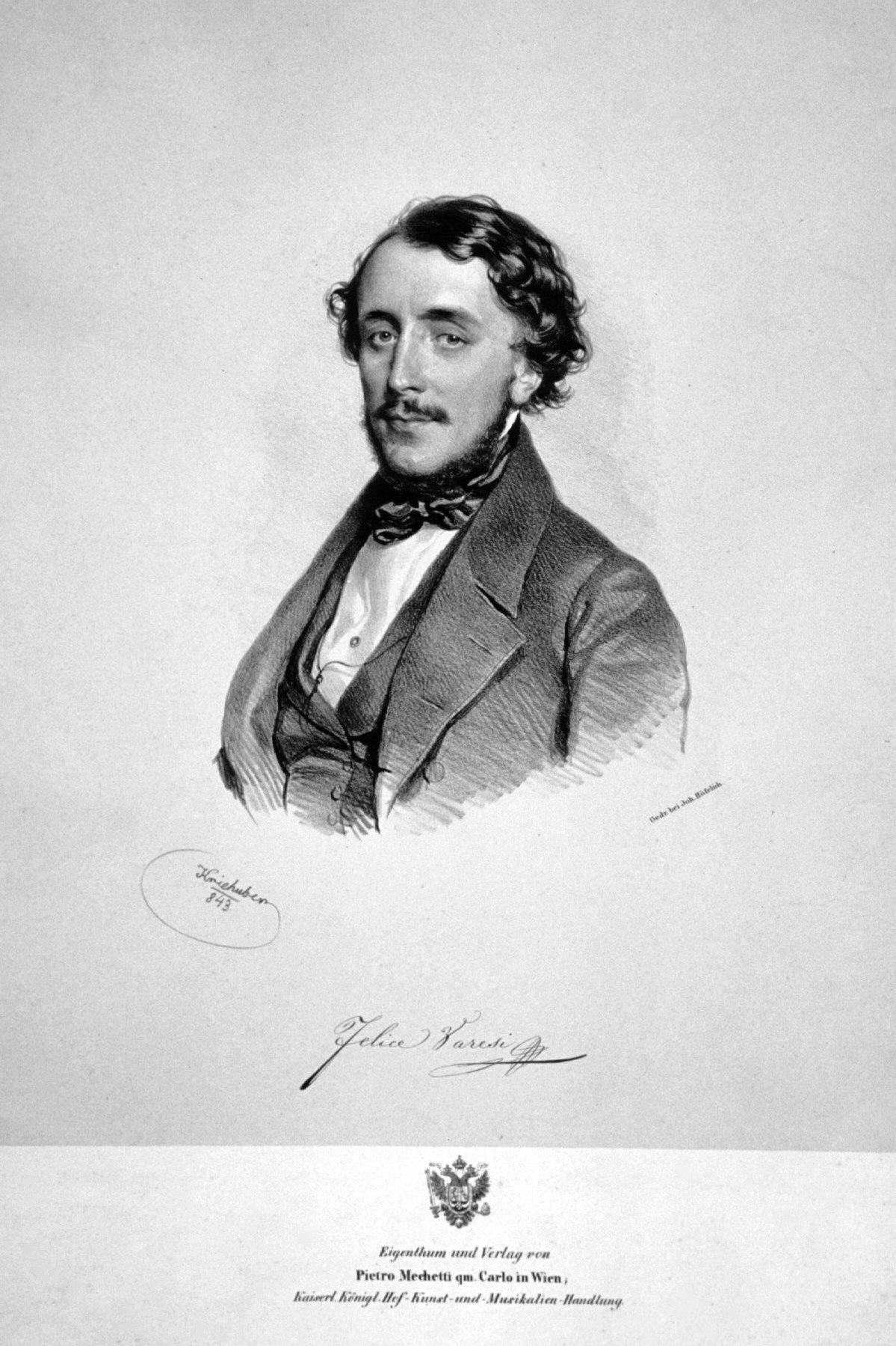 Felice Varesi (1813-1889), italienischer, von Verdi sehr geschätzter, Bariton. Rigoletto und Germont der Uraufführungen.